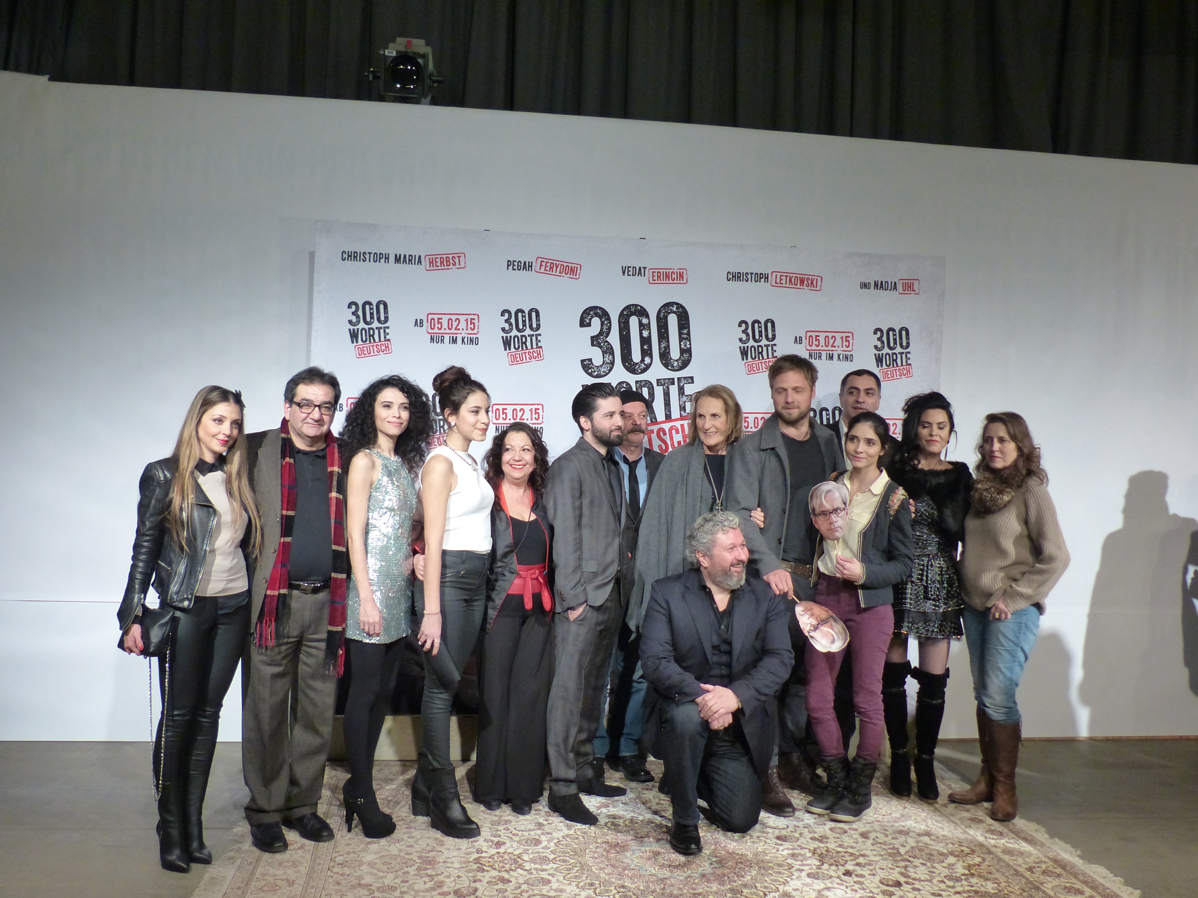 Alle Mitwirkende bei der Premiere von "300 Worte Deutsch", Januar 2015.